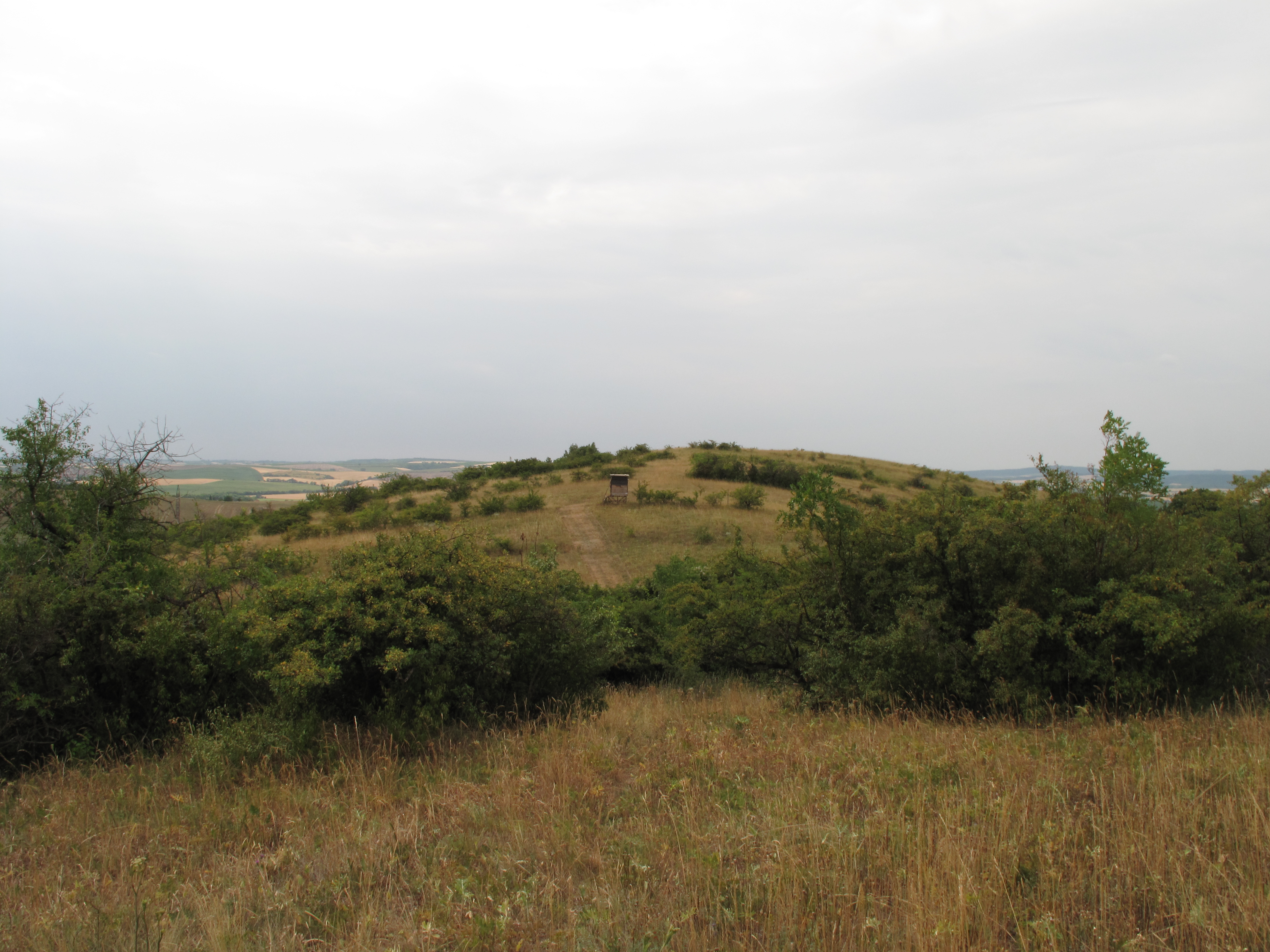 Přírodní rezervace Liščí vrch. Okres Břeclav, Česká republika.